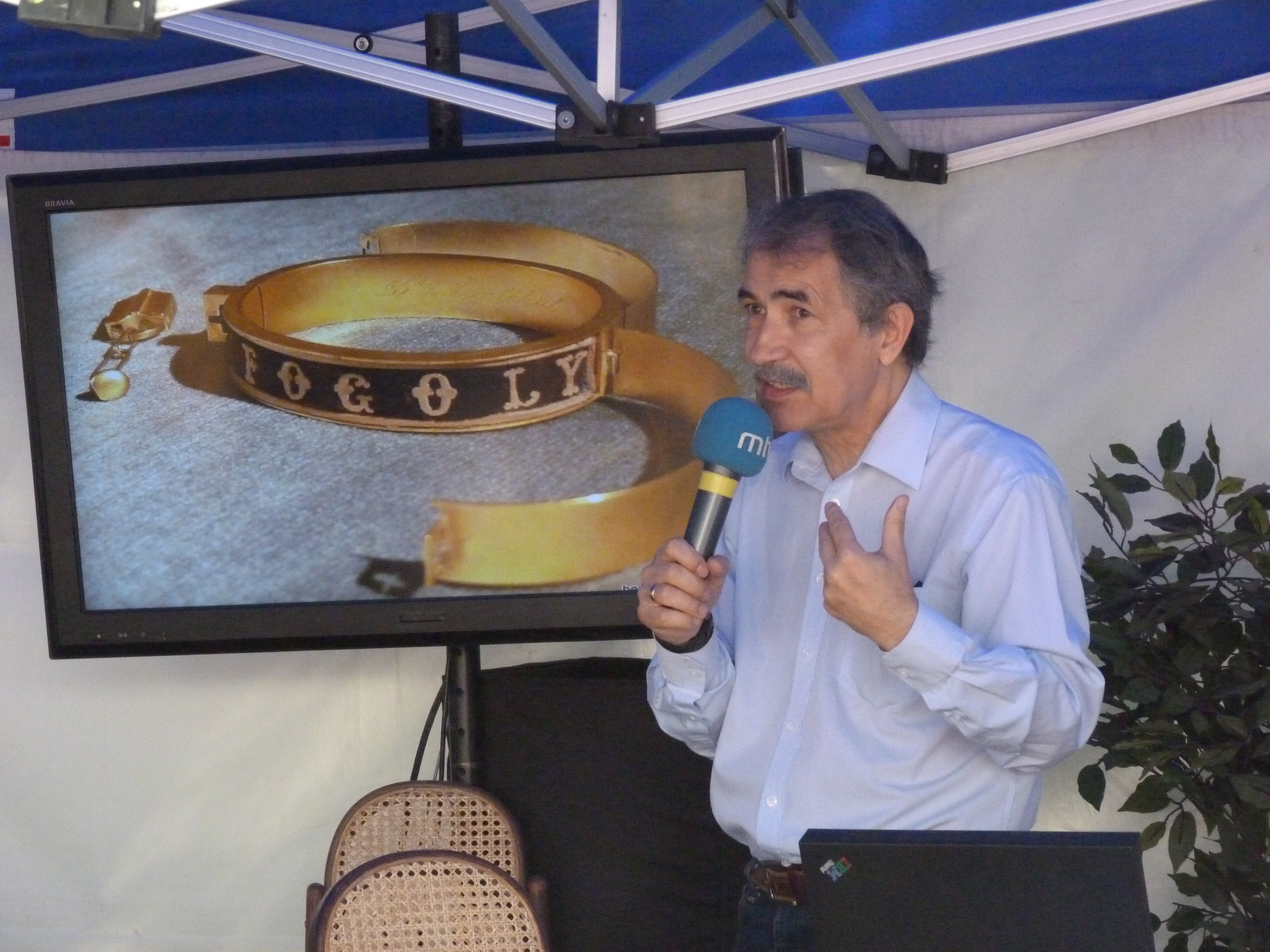 A felvétel 2012. május 19 -én szombaton készültek Budapesten, a Nemzeti Múzeumnál. 17. Alkalommal rendezték meg a Múzeumok Majálisát. Petőfi Irodalmi Múzeum: - Magyar Irodalmi Emlékházak Egyesülete kiadványszerkesztés. Az egyetlen Petőfi fénykép története, A IX. Református Zenei Fesztivál 500 Fős Fesztiválzenekarának koncertje. Magyar Posta.